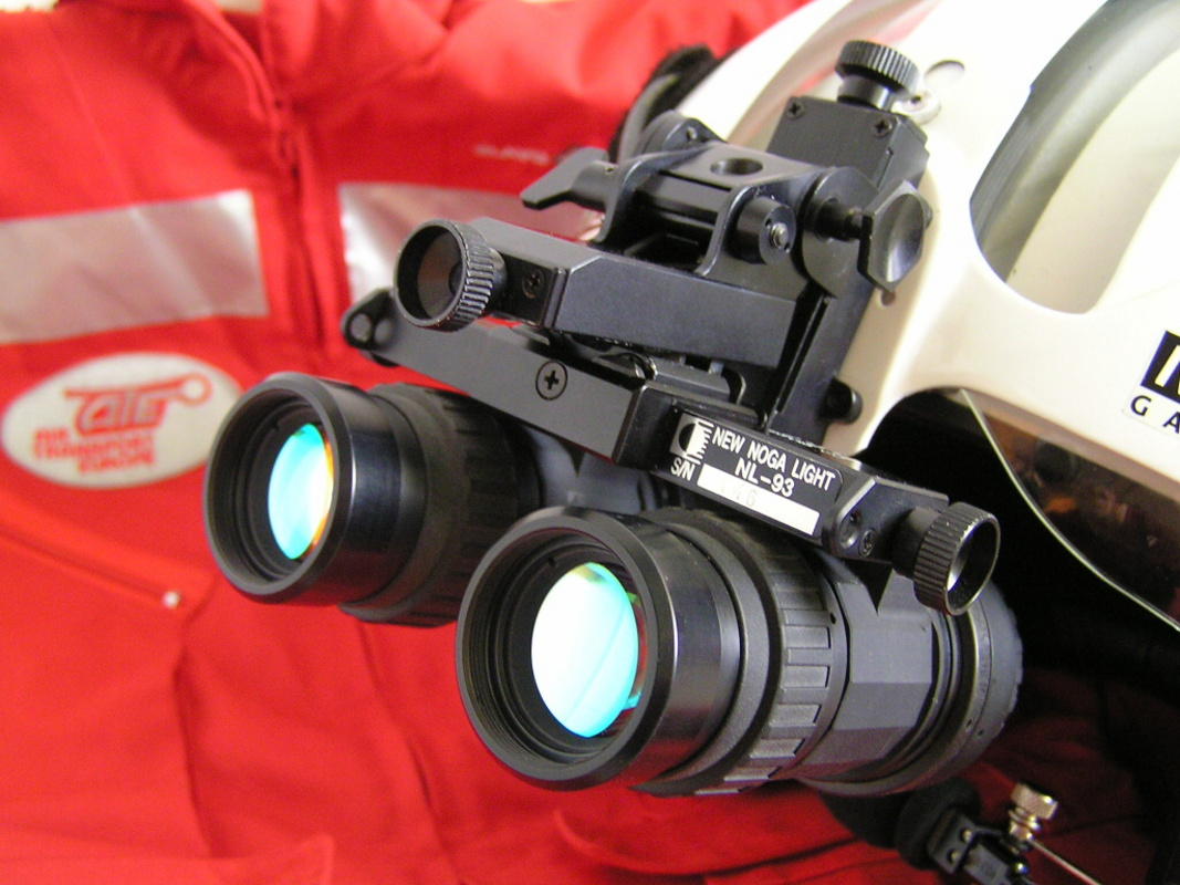 Okluliare NVG na nočné videnie pre pilotov vrtuľníkov